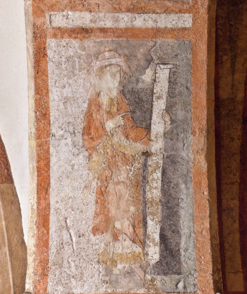 Kirche Altlichtenwarth, Freske, Prophet mit Spruchband